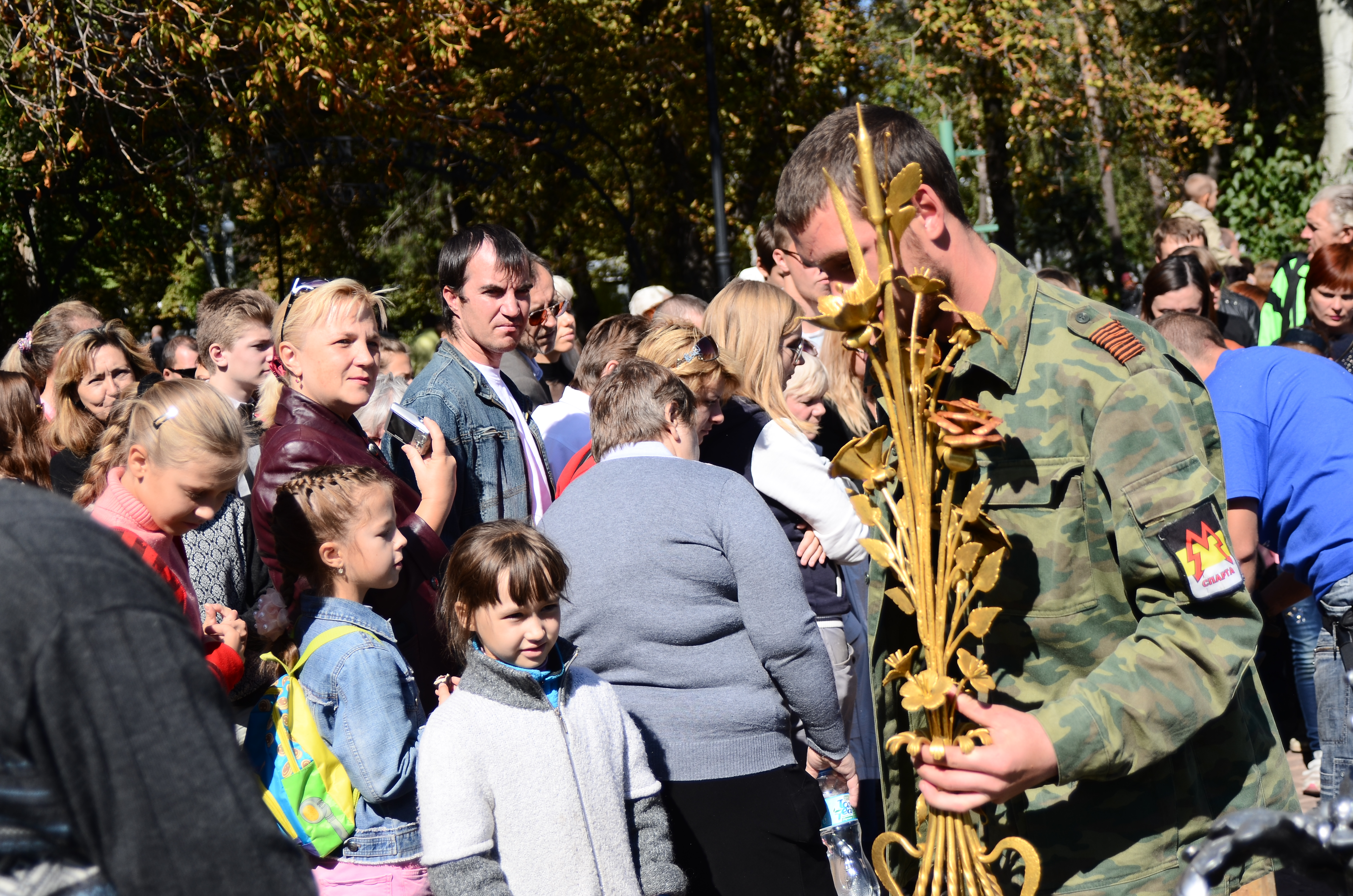 Кузнечный фестиваль в Донецке